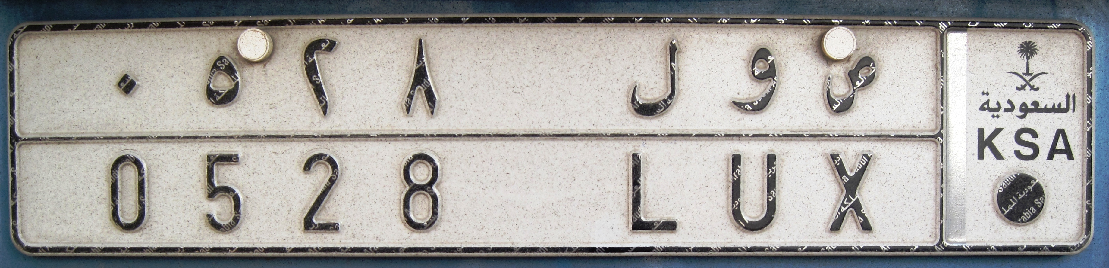 kentekenplaat Saoedi-Arabië 2